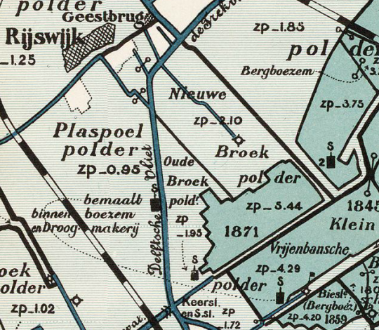 Nieuwe_en_Oude_Broekpolder